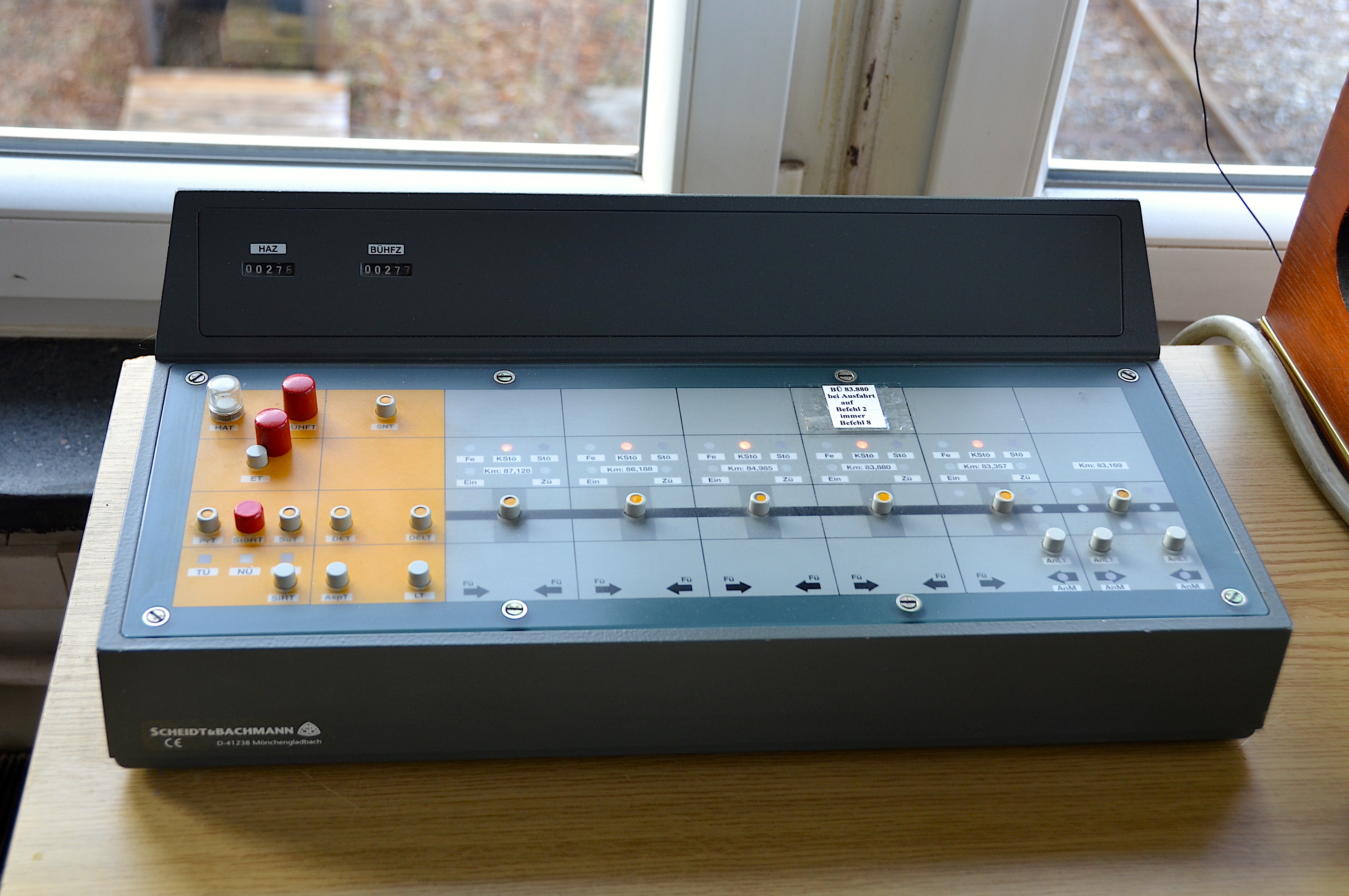 Stellpult Bahnübergangstechnik, Bahnhof Mengen